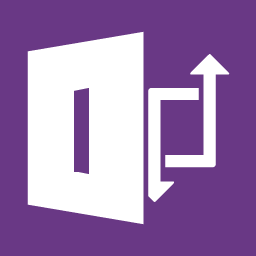 Microsoft InfoPath 2013 icon